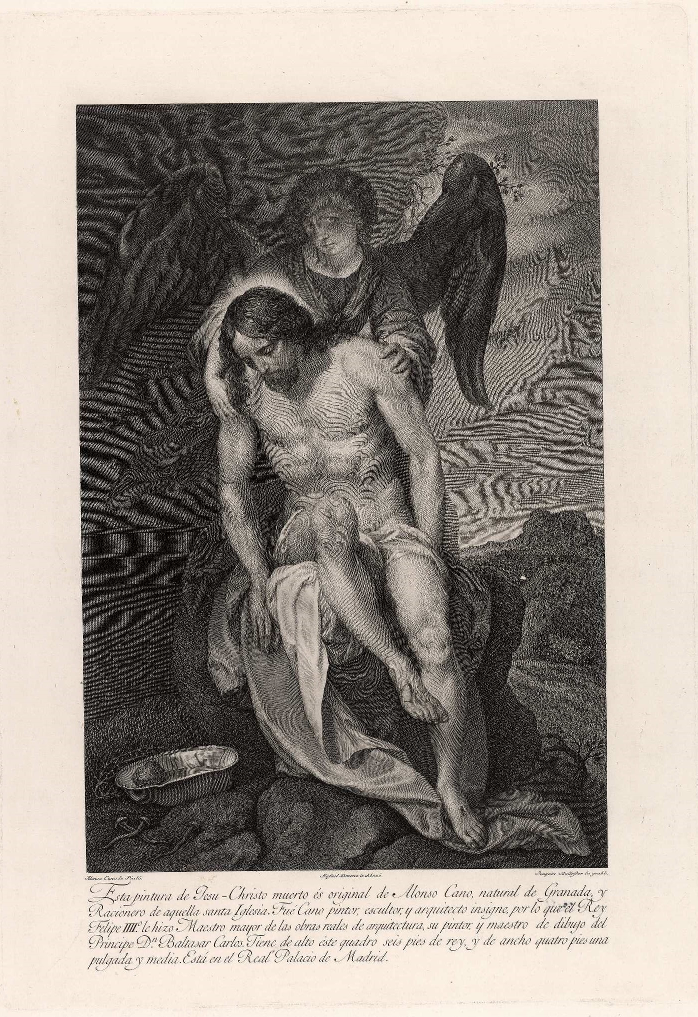 Cristo muerto, grabado calcográfico. Madrid, Biblioteca Nacional de España